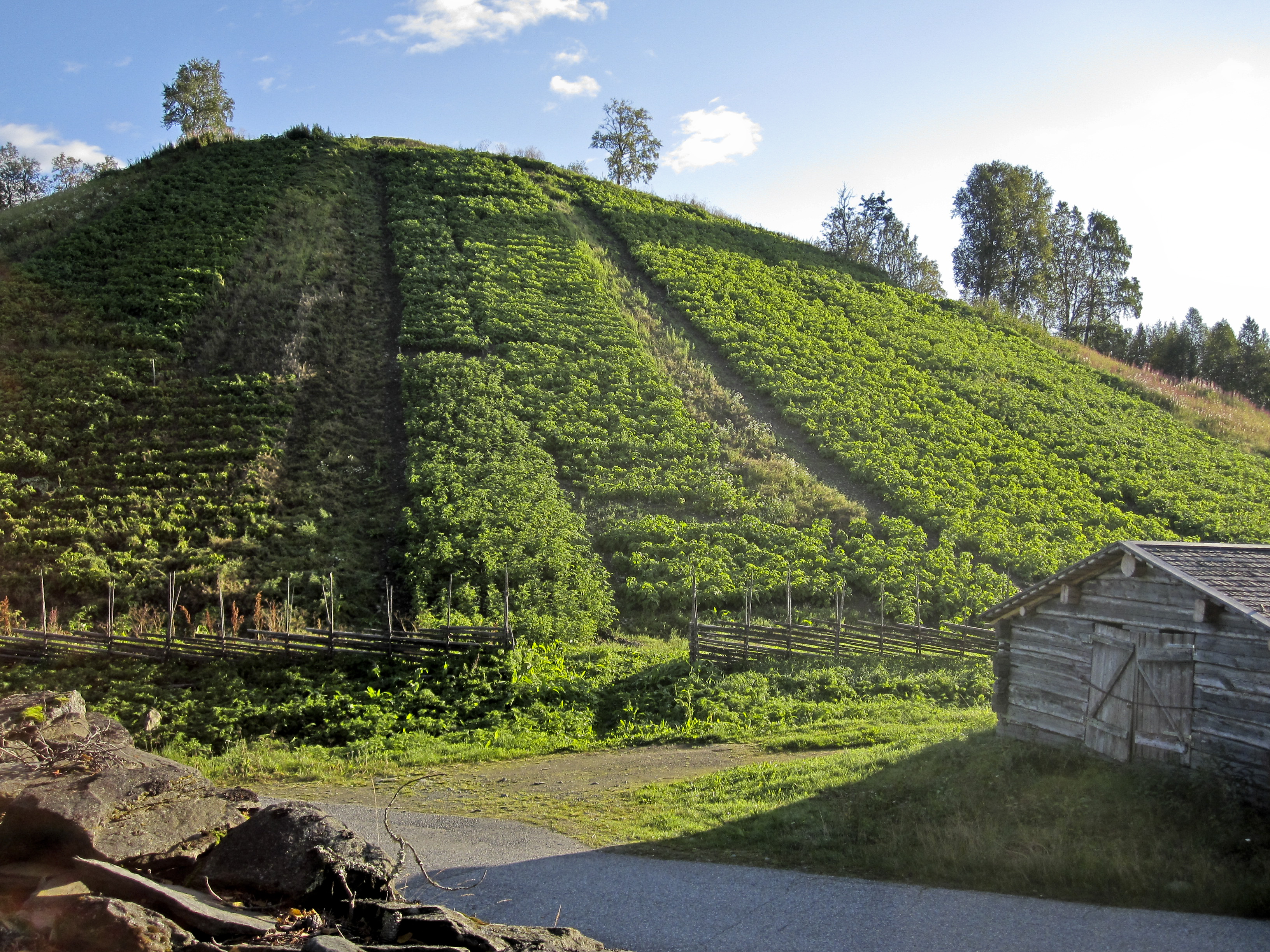 Potatisbacken, Ammarnäs, Sorsele, Sverige.